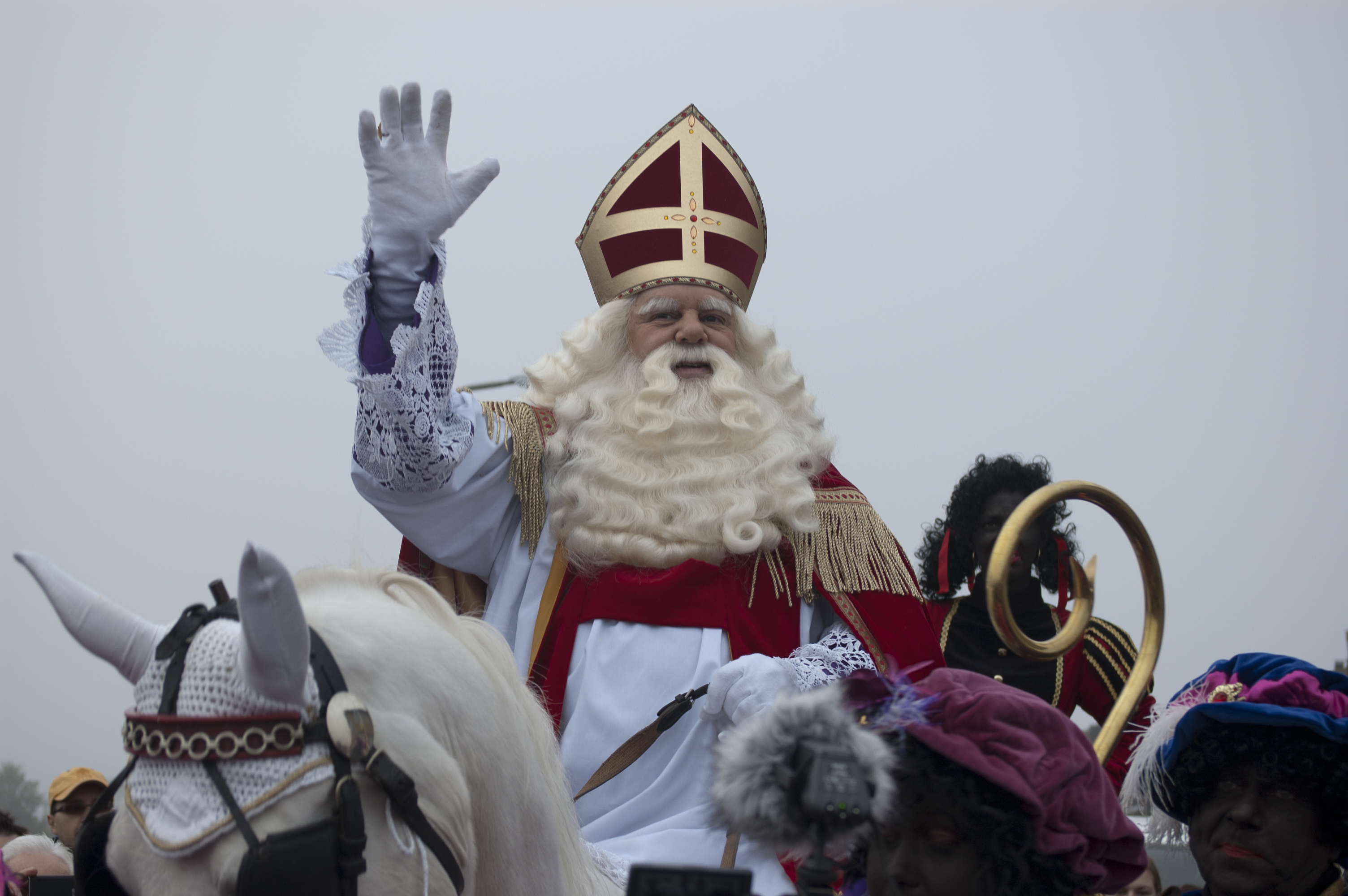 Intocht van Sinterklaas, Vuykterrein Capelle aan den IJssel.